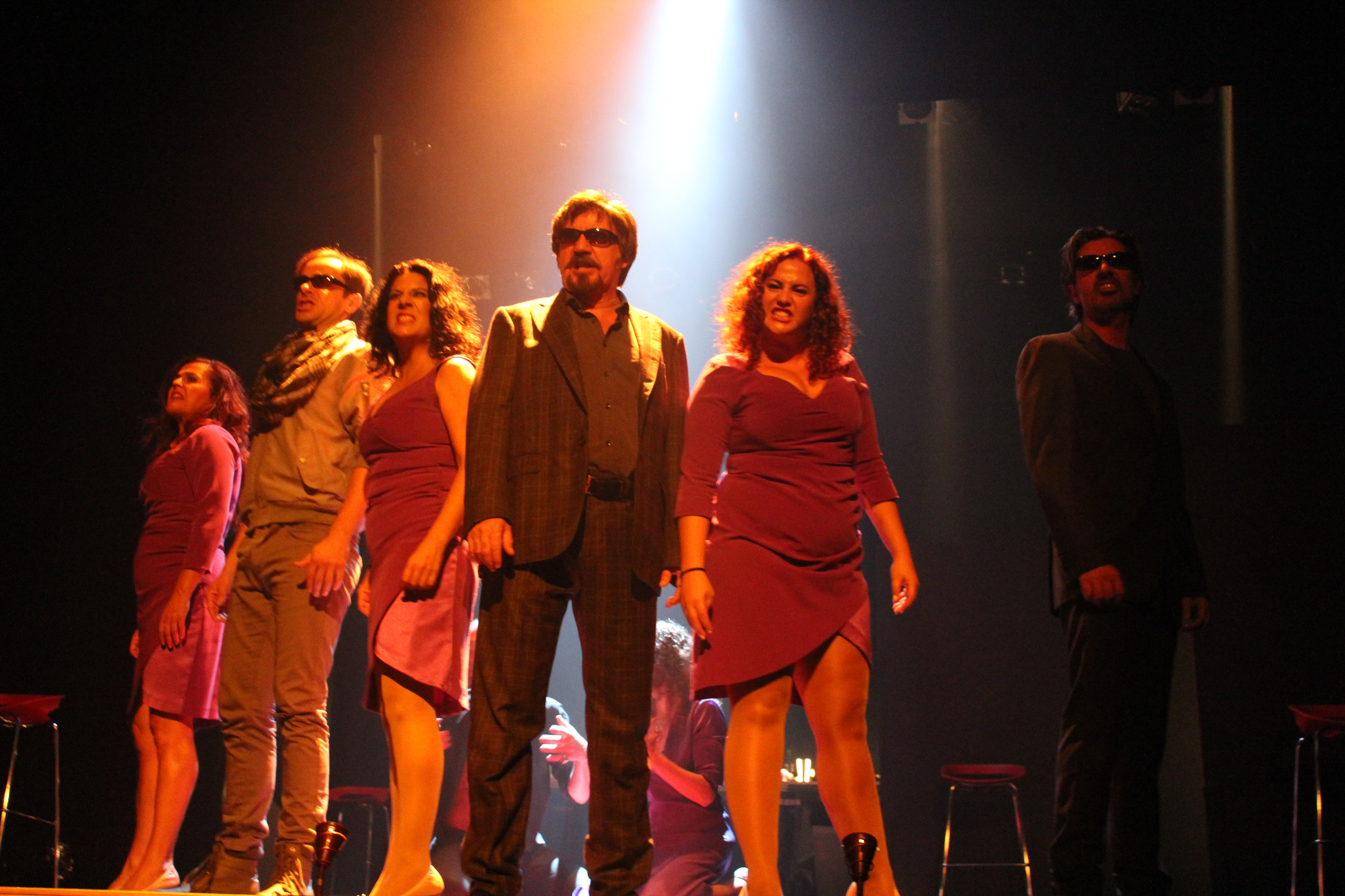 Alquibla Teatro, Macbeth